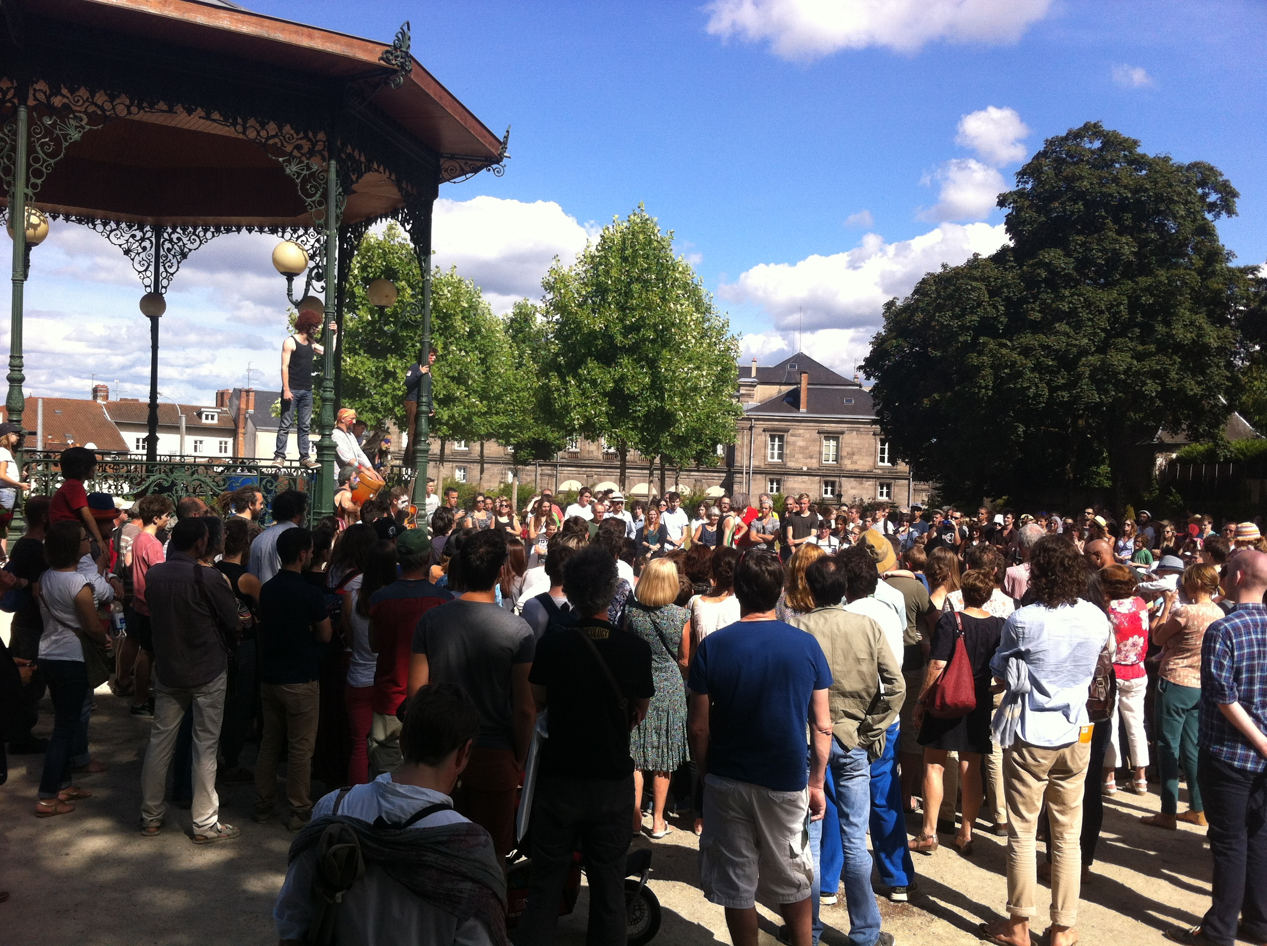 Un spectacle du festival de théâtre de rue Urbaka, à Limoges, juin 2015.